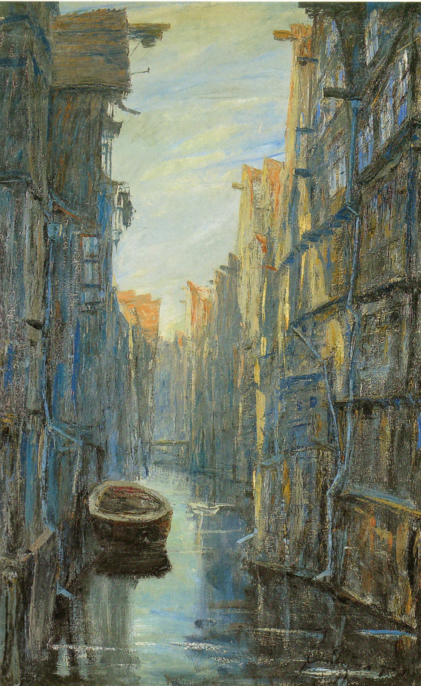 Hamburger Fleet, Öl auf Leinwand, 161x101